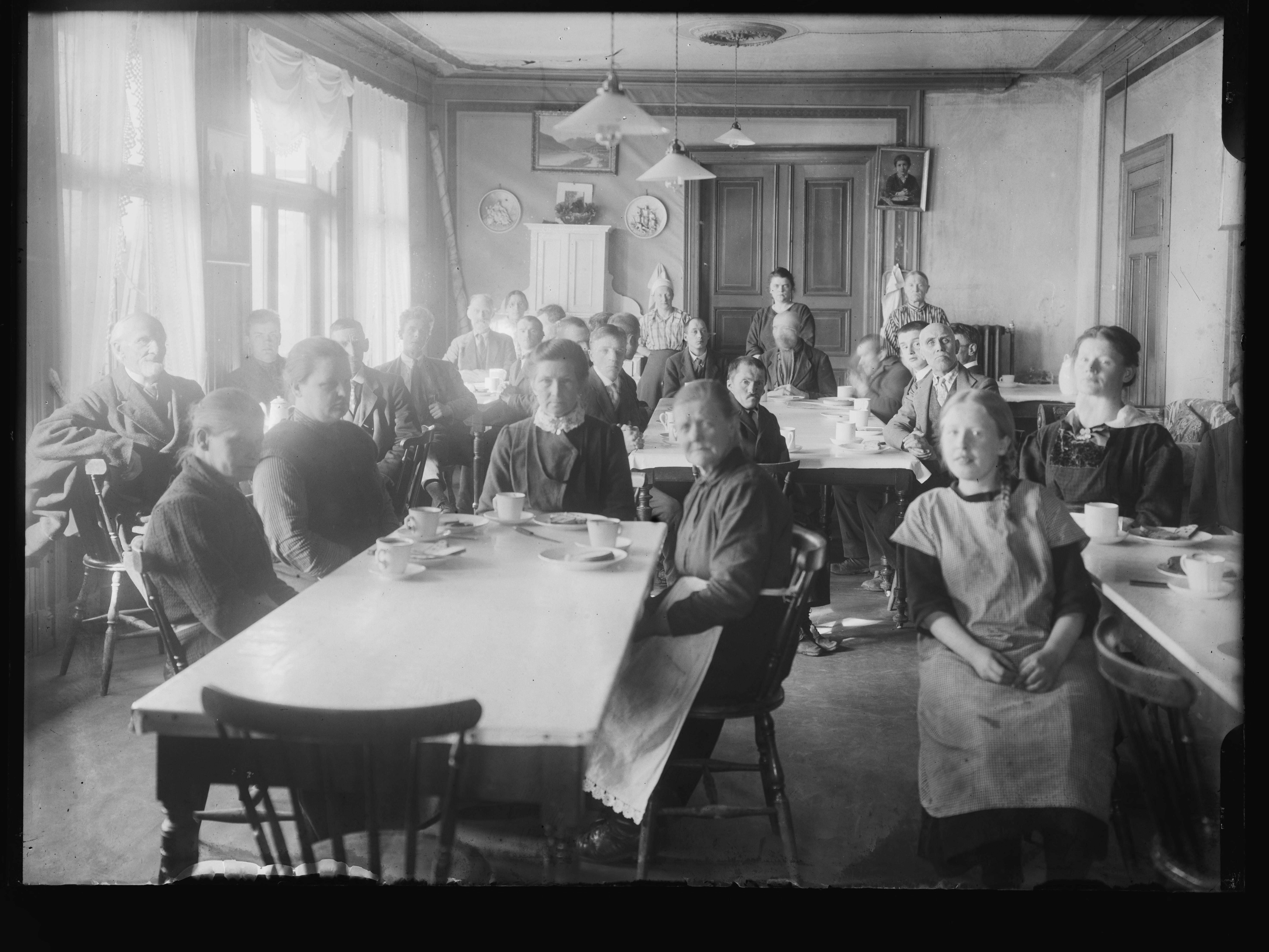 Bildet er hentet fra Nasjonalbibliotekets bildesamling. Anmerkninger til bildet var: Påskrift arkivark: Hjemmet for Døve Arkivnummer: 421 Nordstrand, Oslo, Oslo